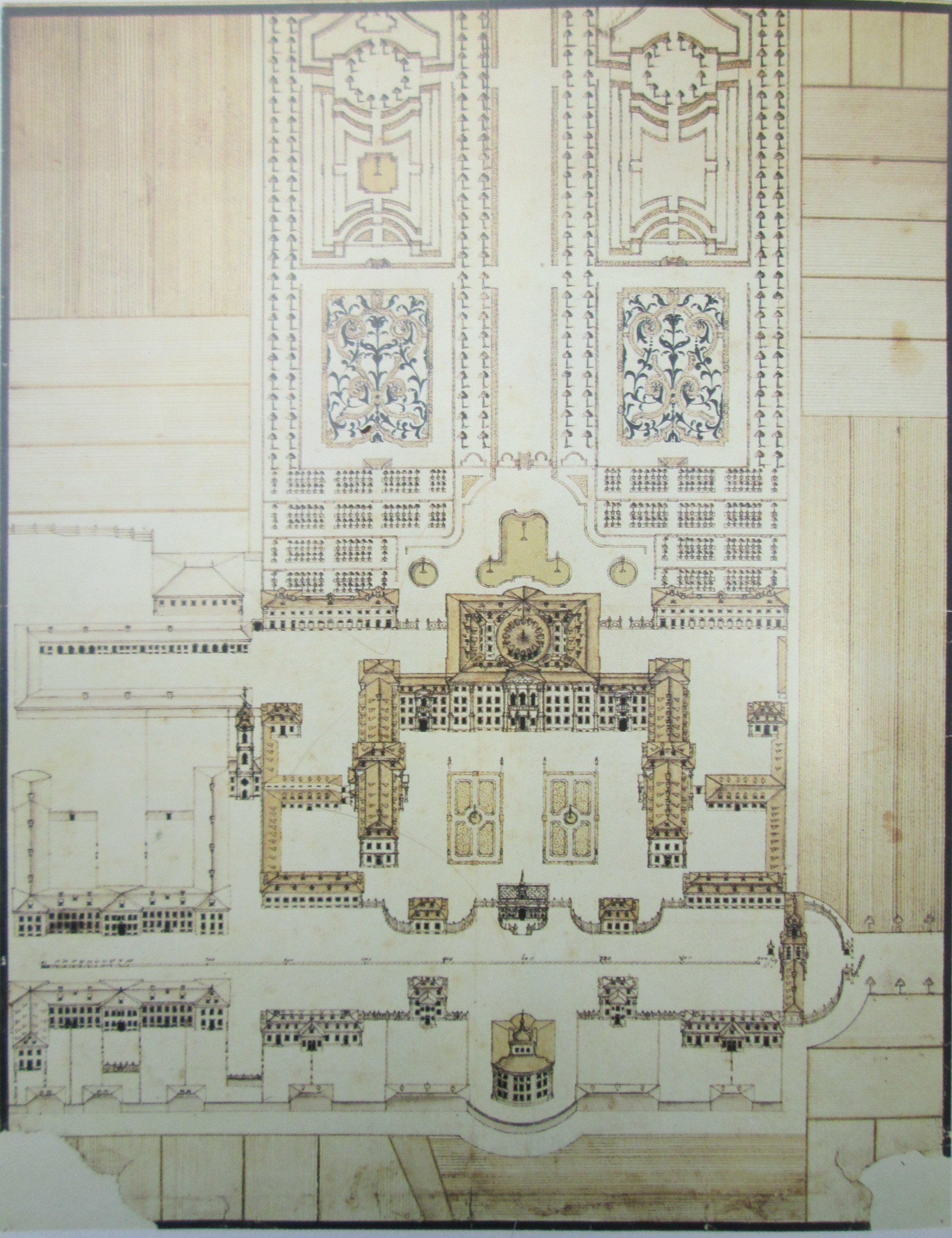 Vogelschauplan von Schloss und Garten Bruchsal